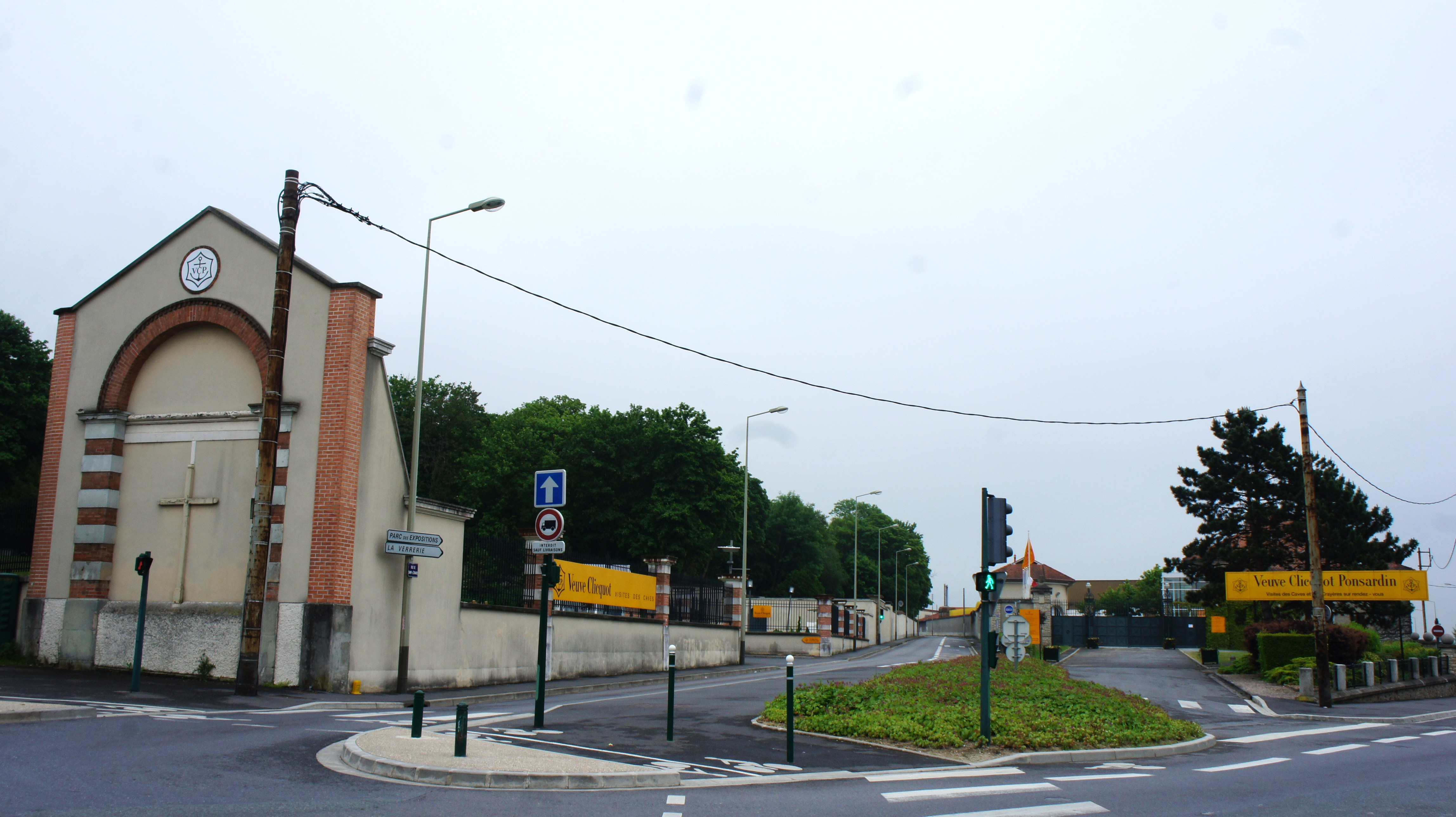 Ensemble de structures de la maison de champagne Veuve Clicquot, anciennement Abel-Lepitre .